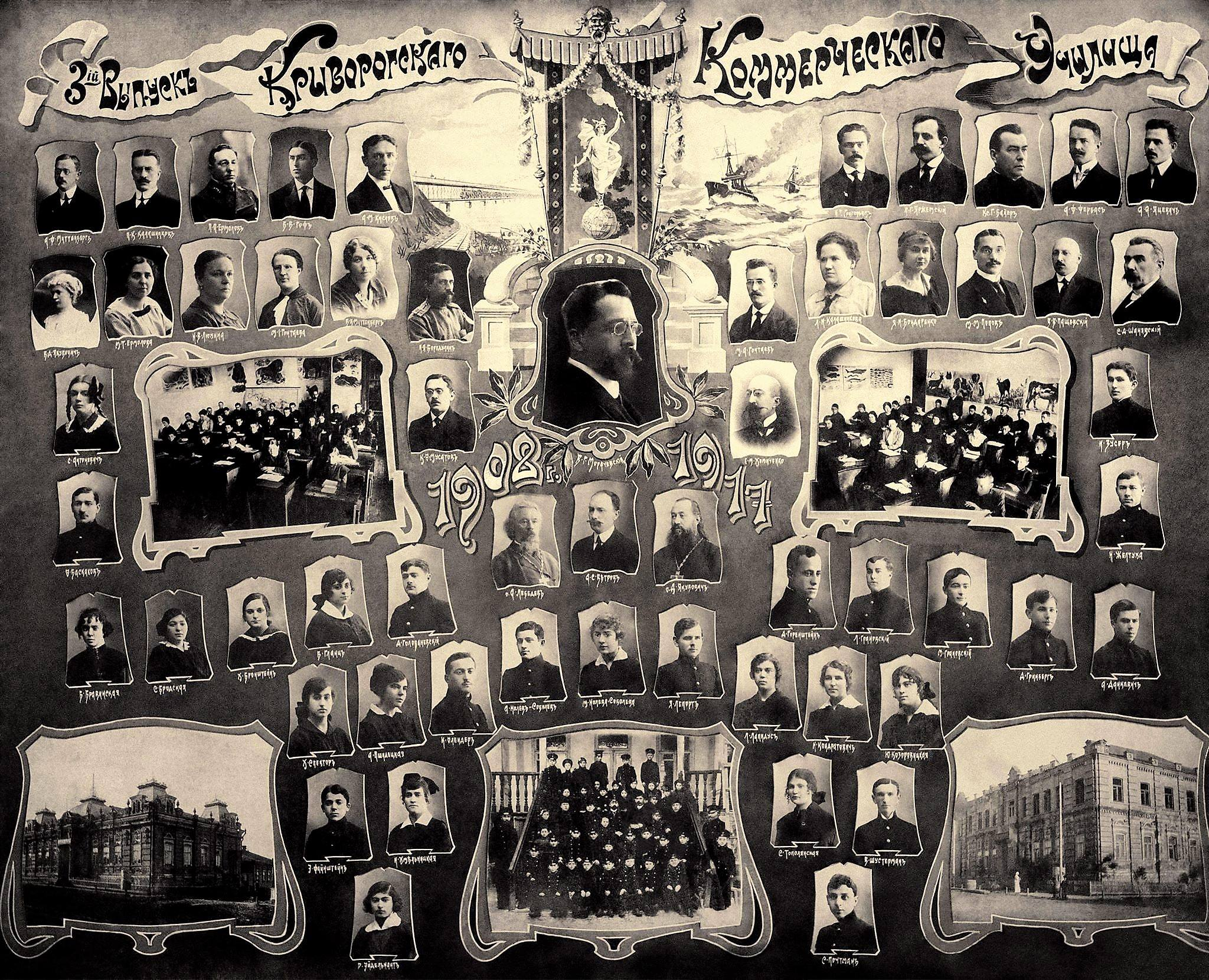 Криворожское коммерческое училище. 3-й выпуск (1917)